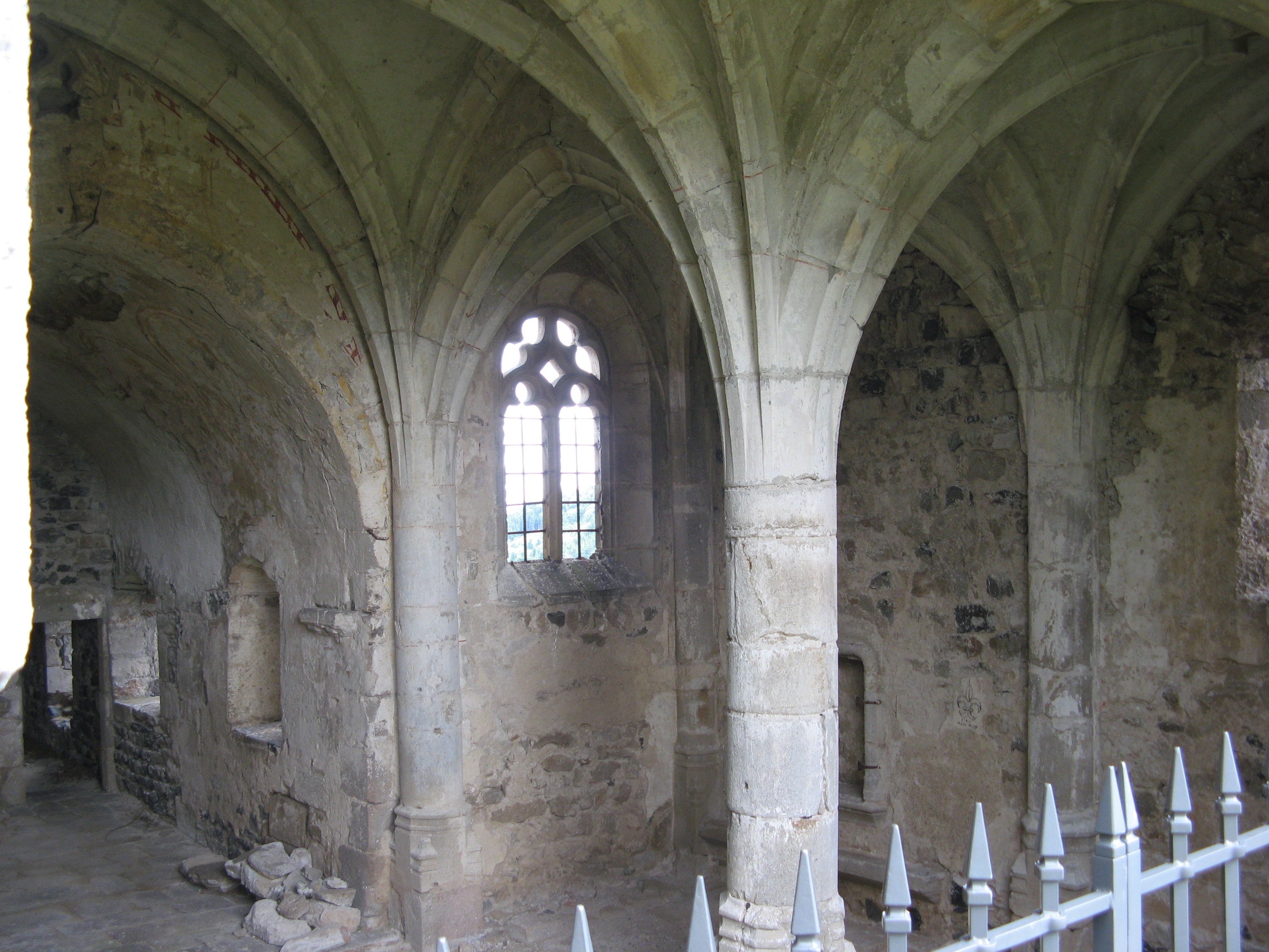 Châtelneuf (Loire), chapelle de Fraisse, transept